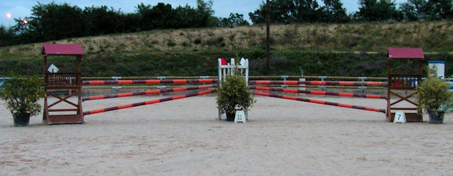 2 Obstacles côté à côte en concours Date et Lieu : 2 Octobre 2006 à Niort Concours : championnat de france des enseignants auteur : Karlyne